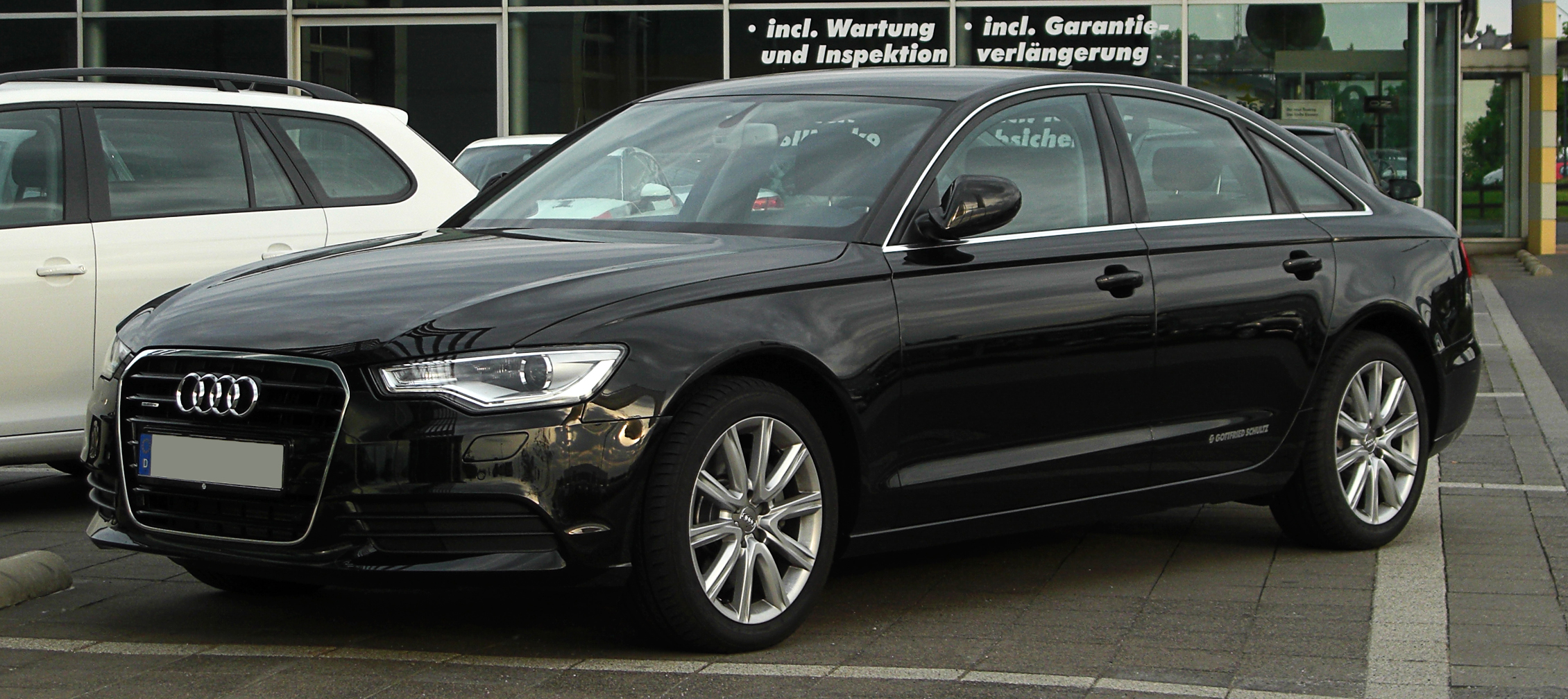 Audi A6 3.0 TDI quattro (C7)